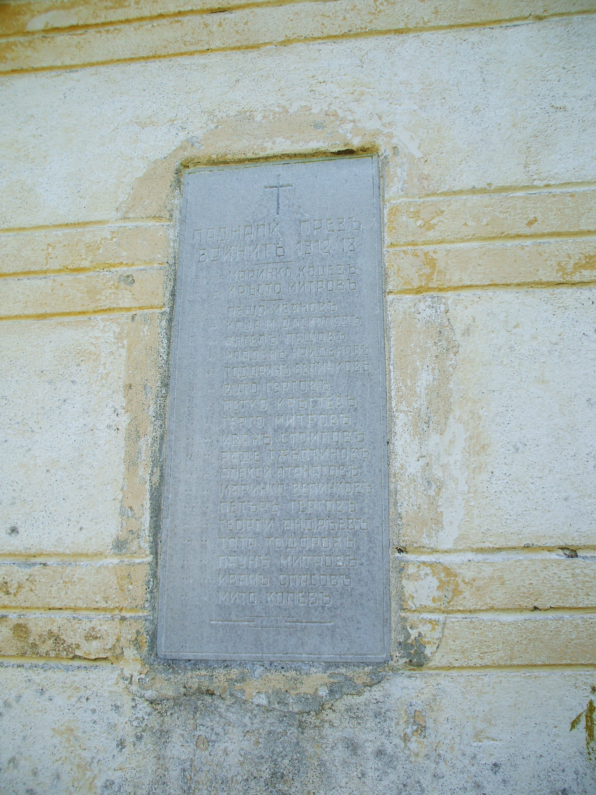 Паметна плоча на загиналите от селото през воините между 1912 - 1918